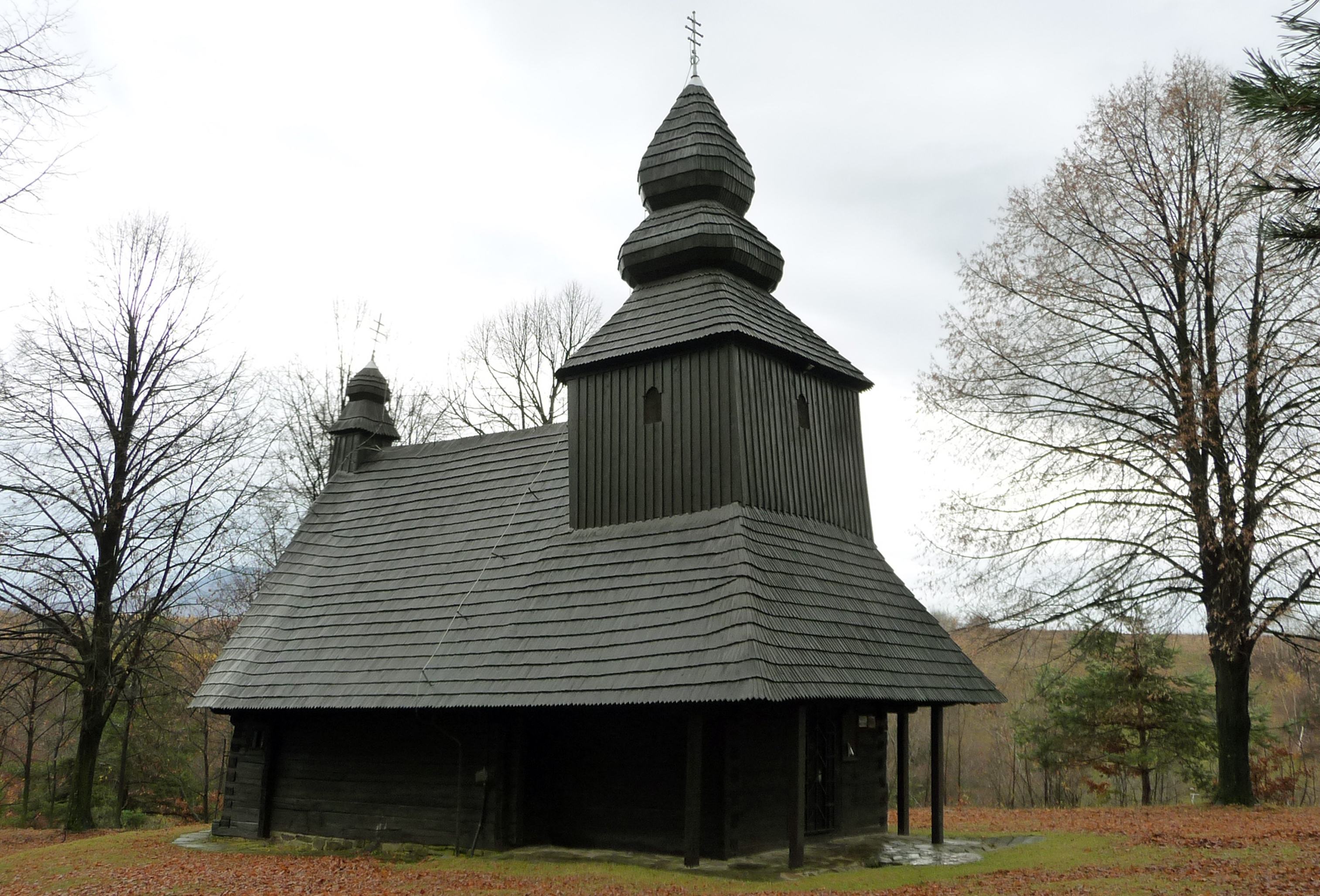 Severozápadná pohľad na cerkov v Ruskej Bystrej okres Snina